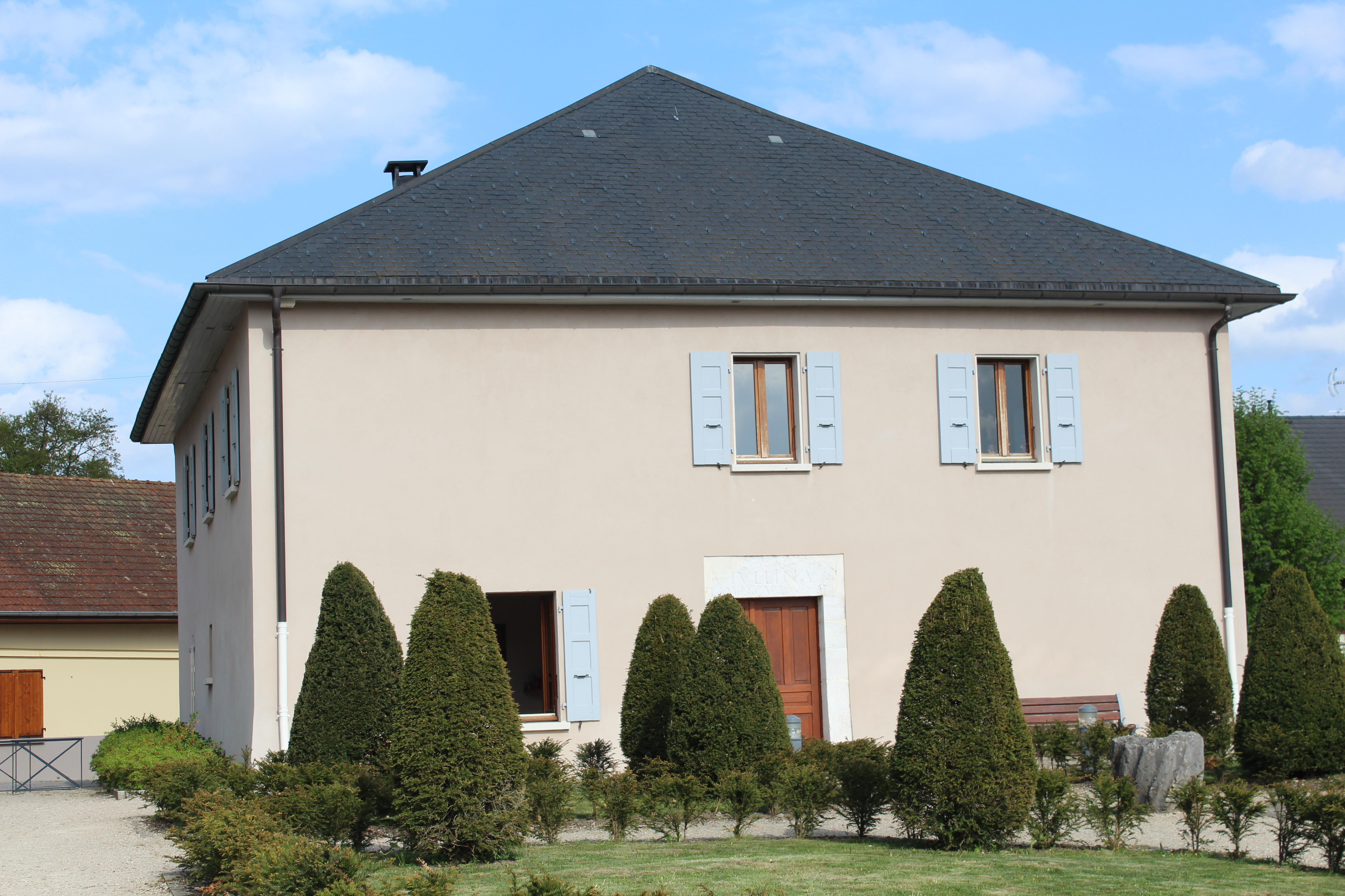 Mairie de Sales, Haute-Savoie.